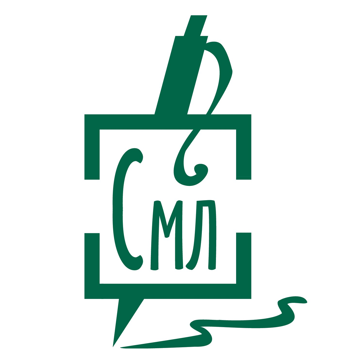 Логотип СМЛ СПР